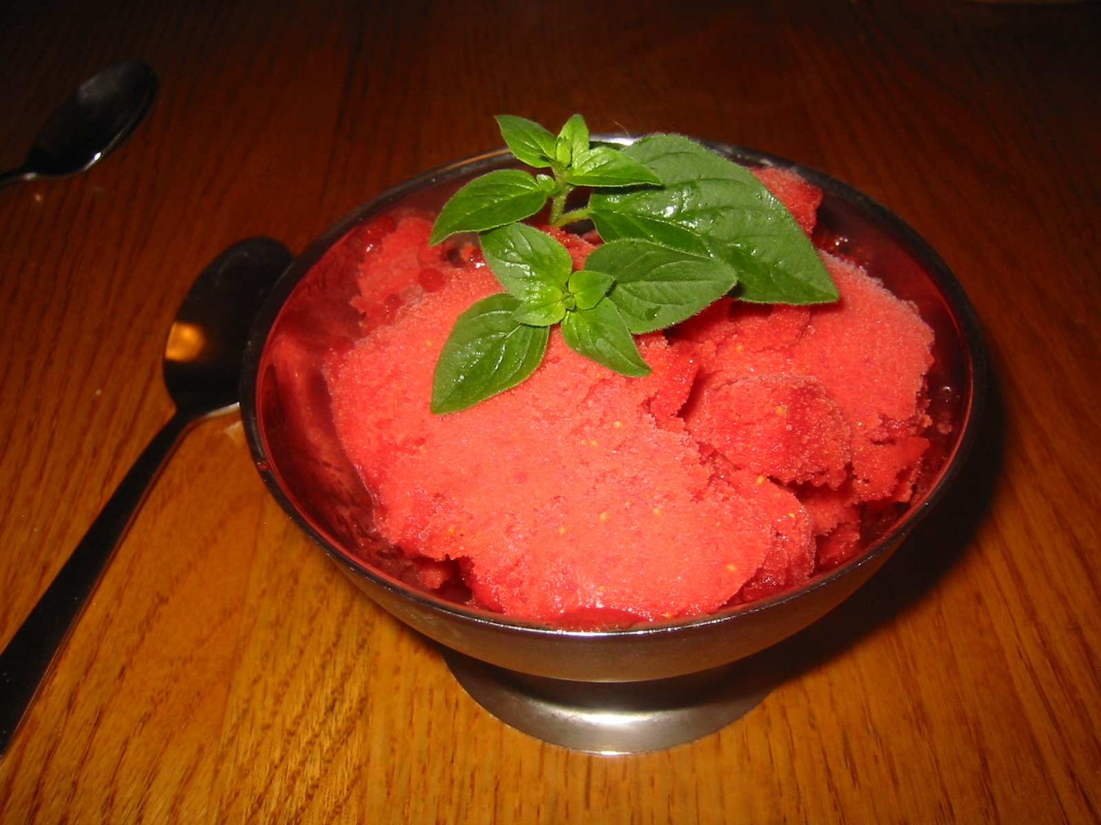 Strawberry sorbet